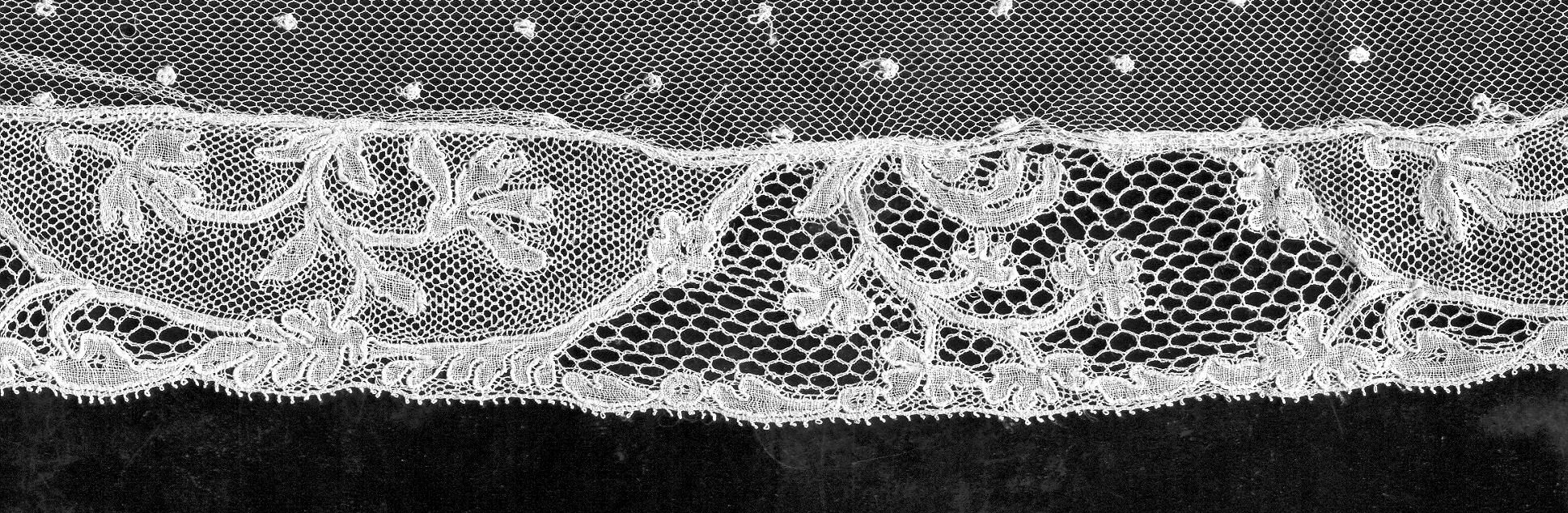 private collection